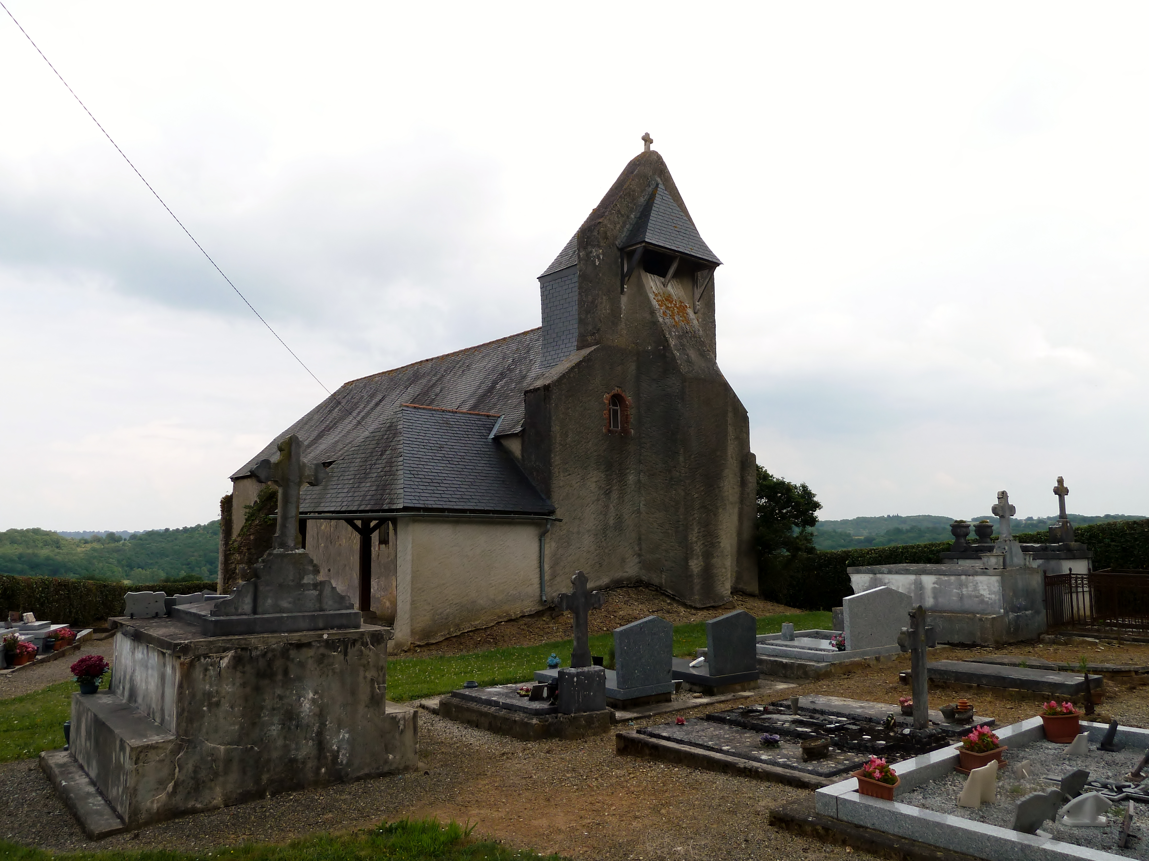 Église de Bassillon-Vauzé